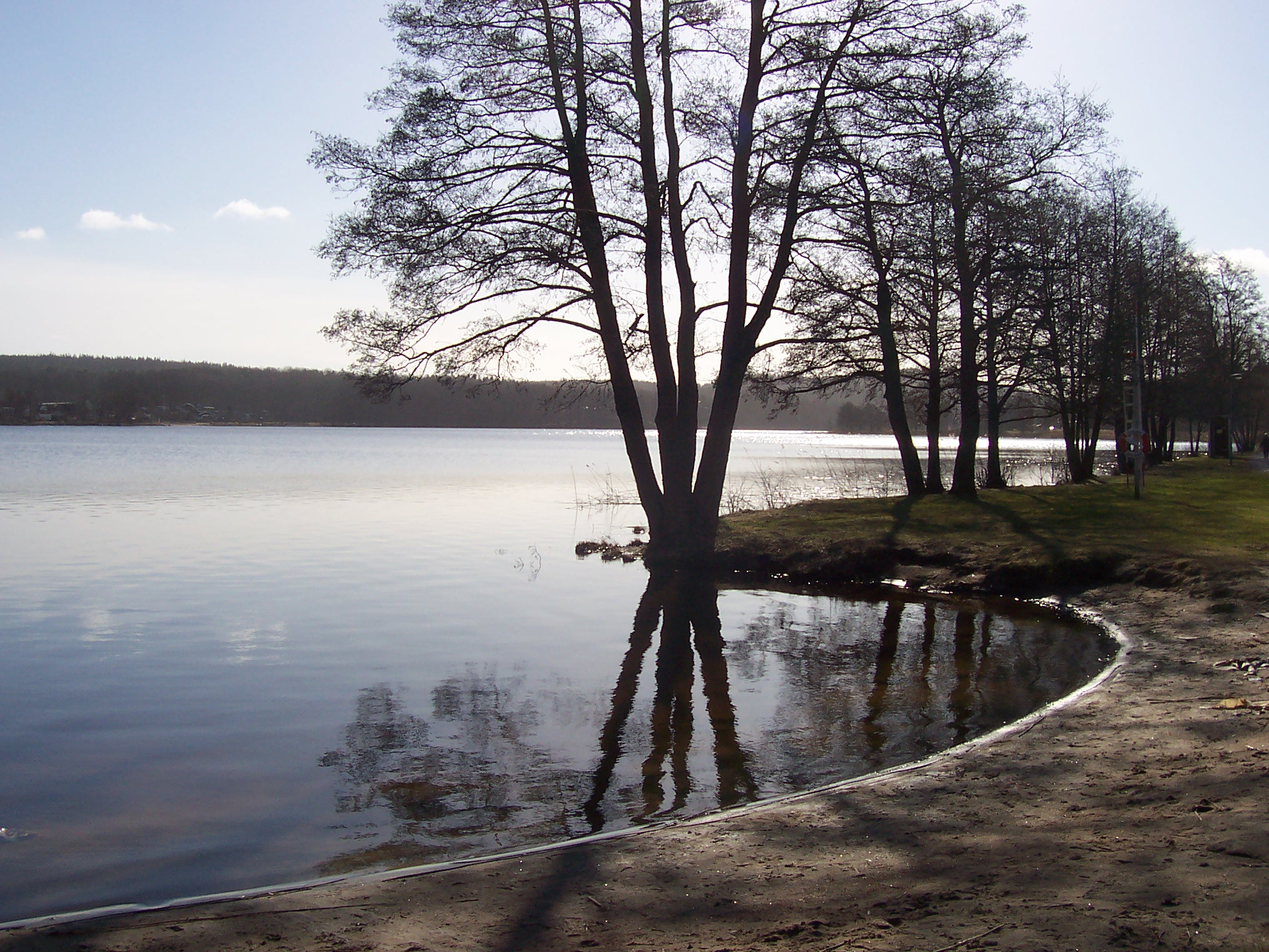 Sjön Gerdsken i Alingsås, Sverige